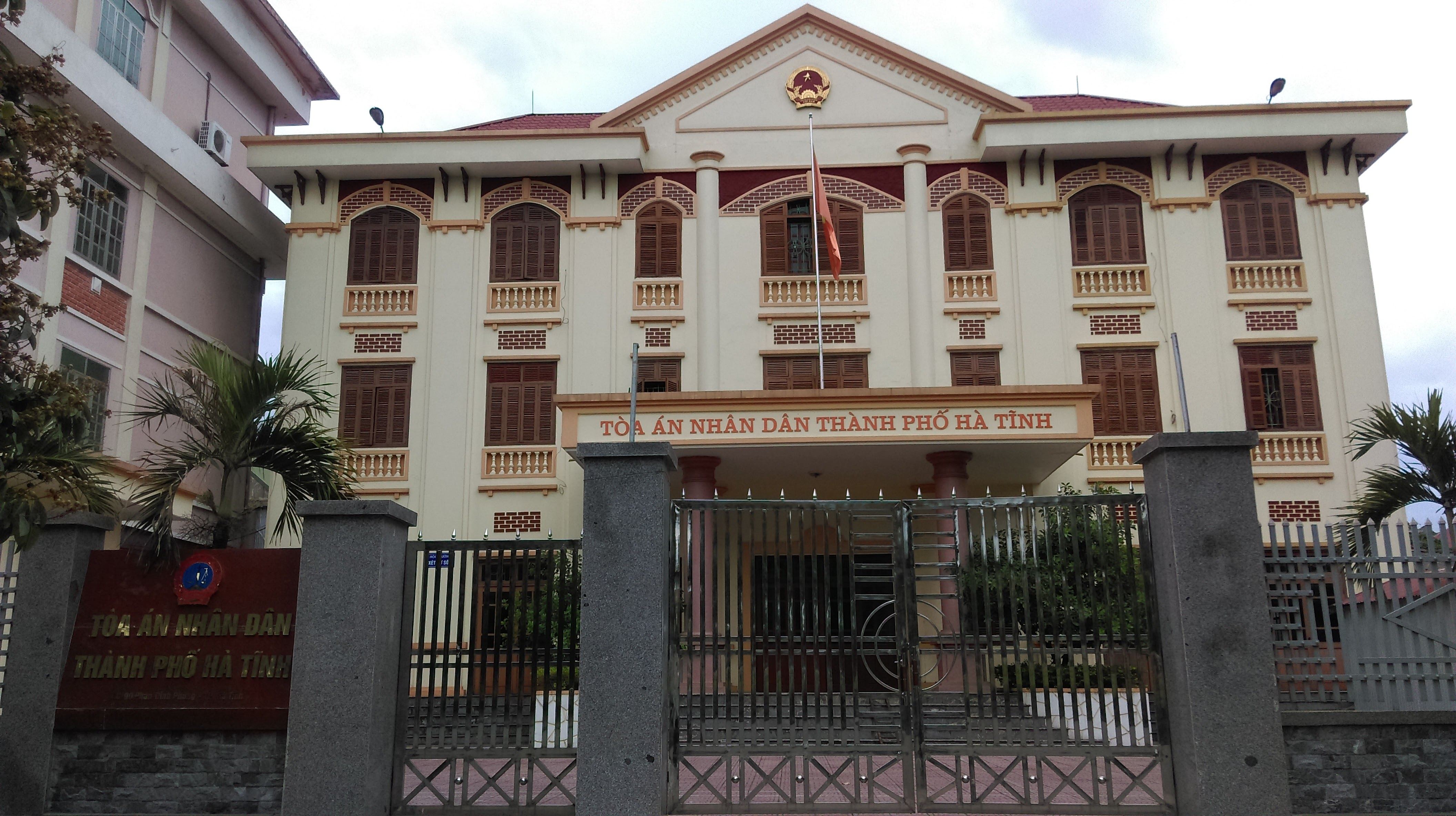 Tòa án Nhân dân Tp Hà Tĩnh